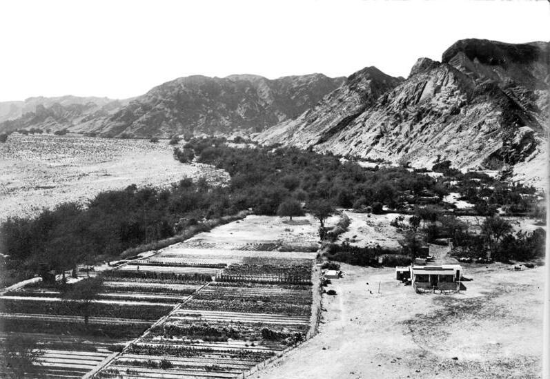 Farm Gonikontes im Swakoptal